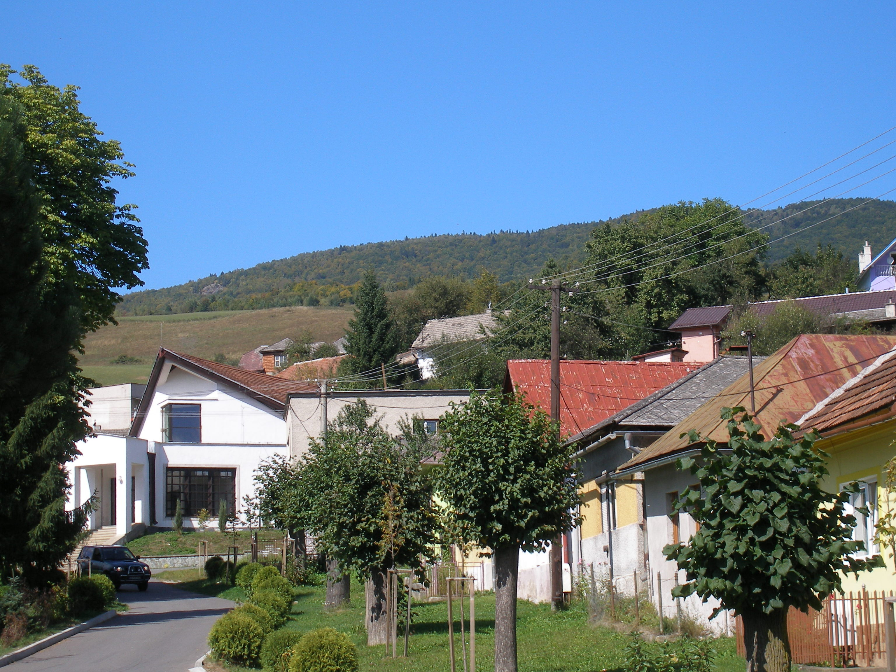 Spišská obec Helcmanovce..Okres Gelnica.